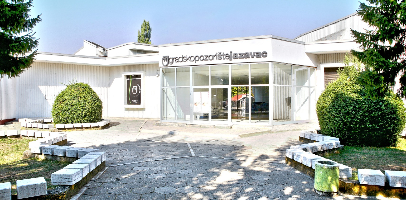 Pozoriste Jazavac